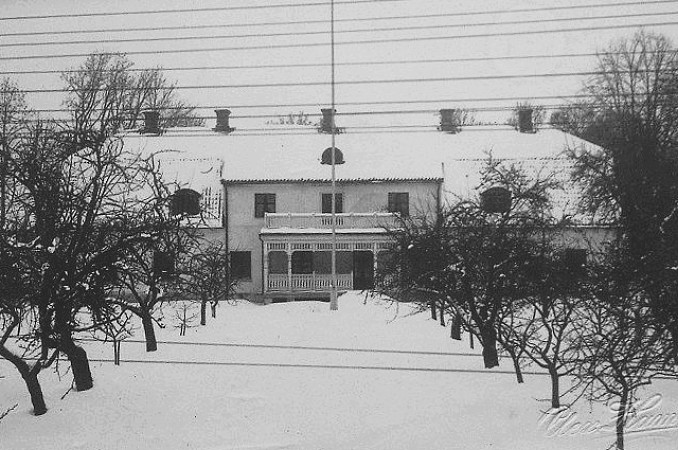 Holbonäs säteri huvudbyggnad (brann ner 12/6 1934)